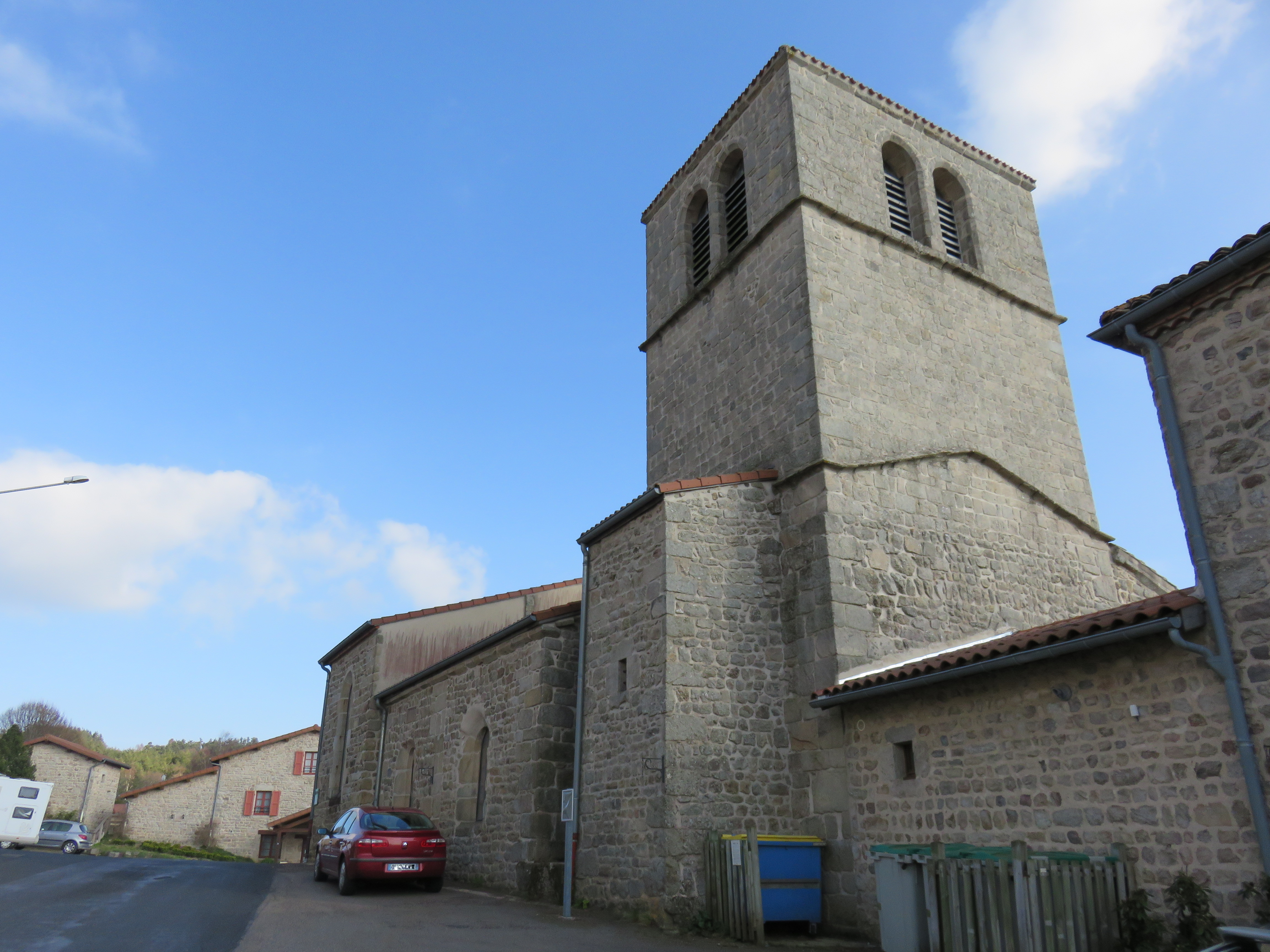 Église Ste Marie de La Chapelle-en-Lafaye, dans le département de la Loire.